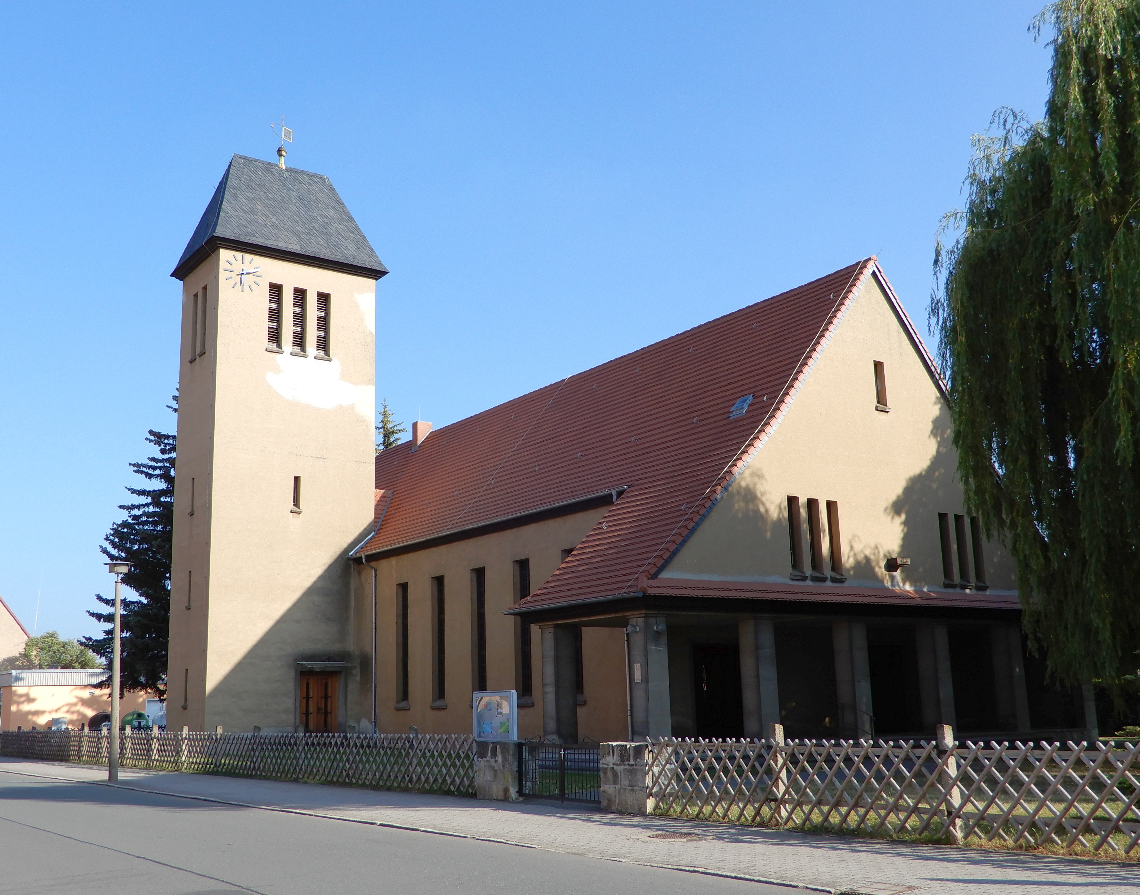 ev. Kirche St. Nicolai II, 1957 errichtet.